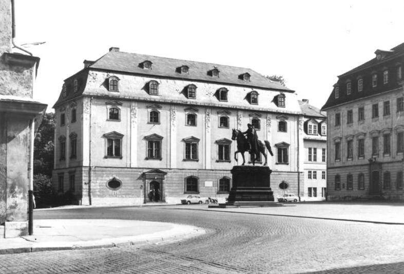 Weimar, Bibliothek Feature - Weimarer Bibliothek will "in den Untergrund" - Einer 300jährigen ist ihr Korsett zu eng ADN-Nationale Forschungs- und Gedenkstätten Weimar- 20.8.91- Weimar- fk- Die 300 Jahre alte Bibliothek der deutschen Klassik in Weimar platzt aus allen Nähten. Rund 850.000 Bücher, Zeitungen und Zeitschriften beherbergt dieses "Französische Schloß" im Herzen der Klassikstadt. (Siehe auch 1991-0820-305N)